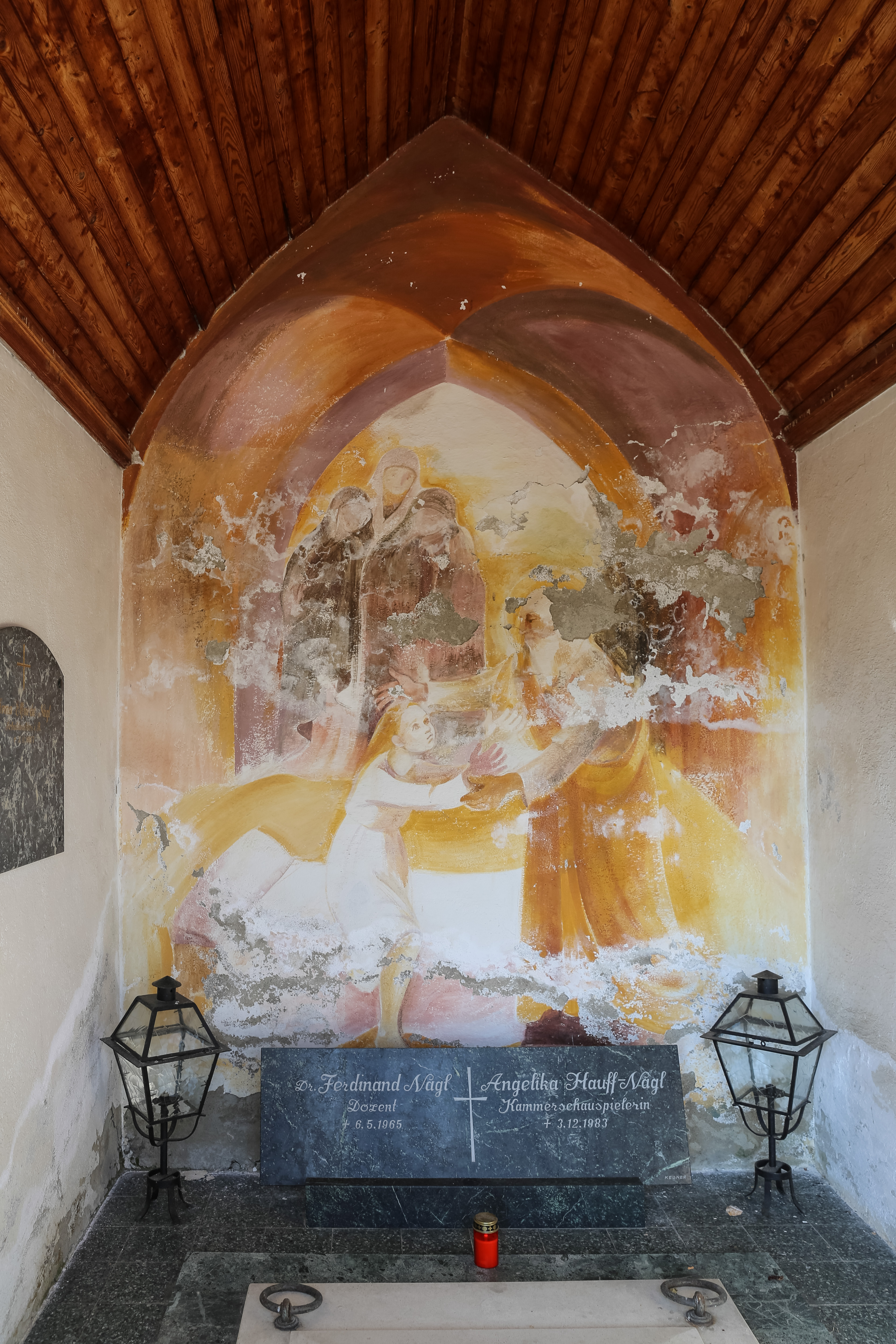 Kath. Filialkirche hl. Andrä, Selpritsch bei Velden am Wörthersee. Gruft Hauff-Nagl. Dieses Foto wurde im Rahmen des von Wikimedia Österreich unterstützten Projekts: Wörthersee 2013 erstellt.